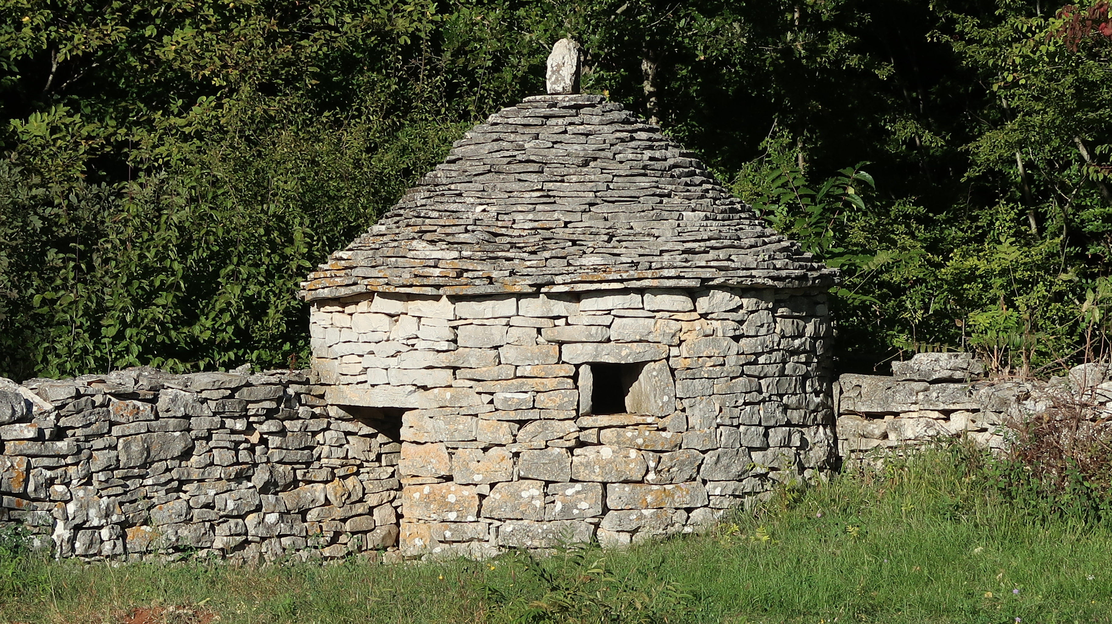 Kroatien (HR) - Gespanschaft Istrien (036) - Kanfanar: Kažun (I), östlich des Friedhofs; Ansischt von Südwesten